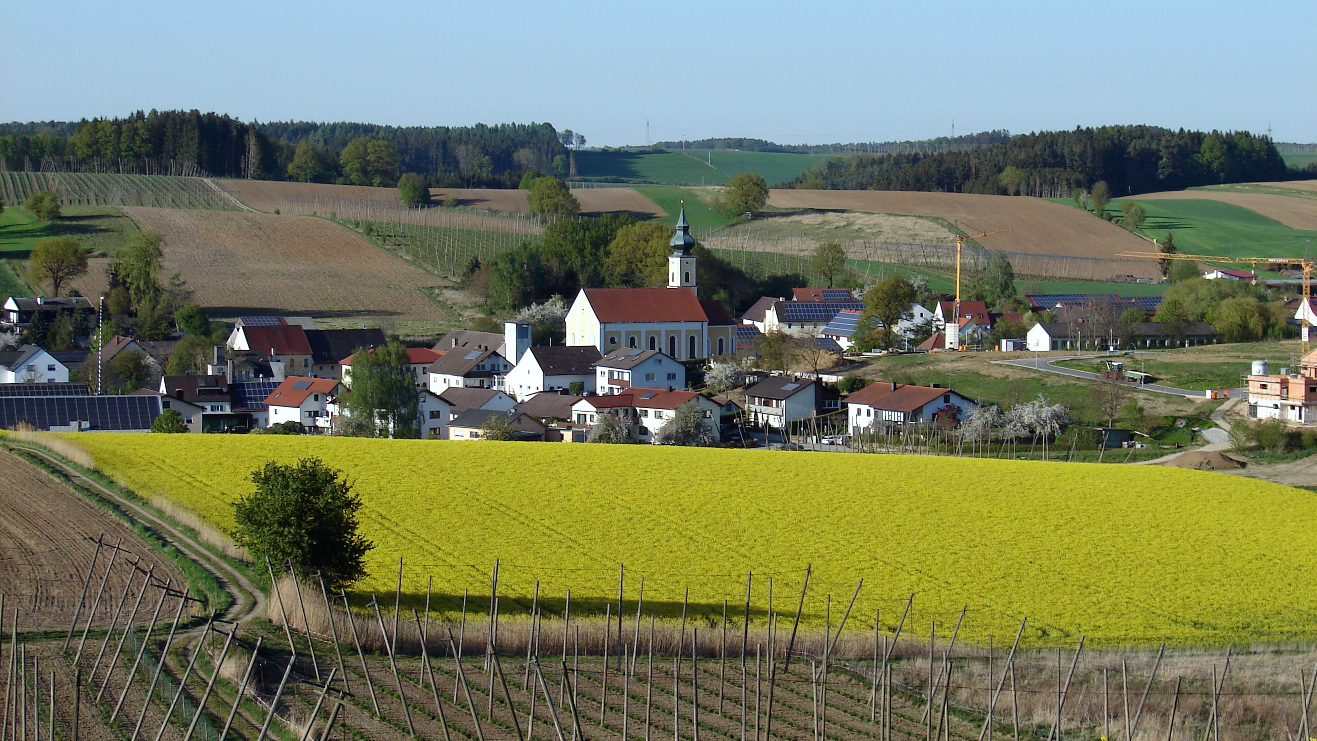 Großgundertshausen ist ein Ortsteil der Gemeinde Volkenschwand im niederbayerischen Landkreis Kelheim.